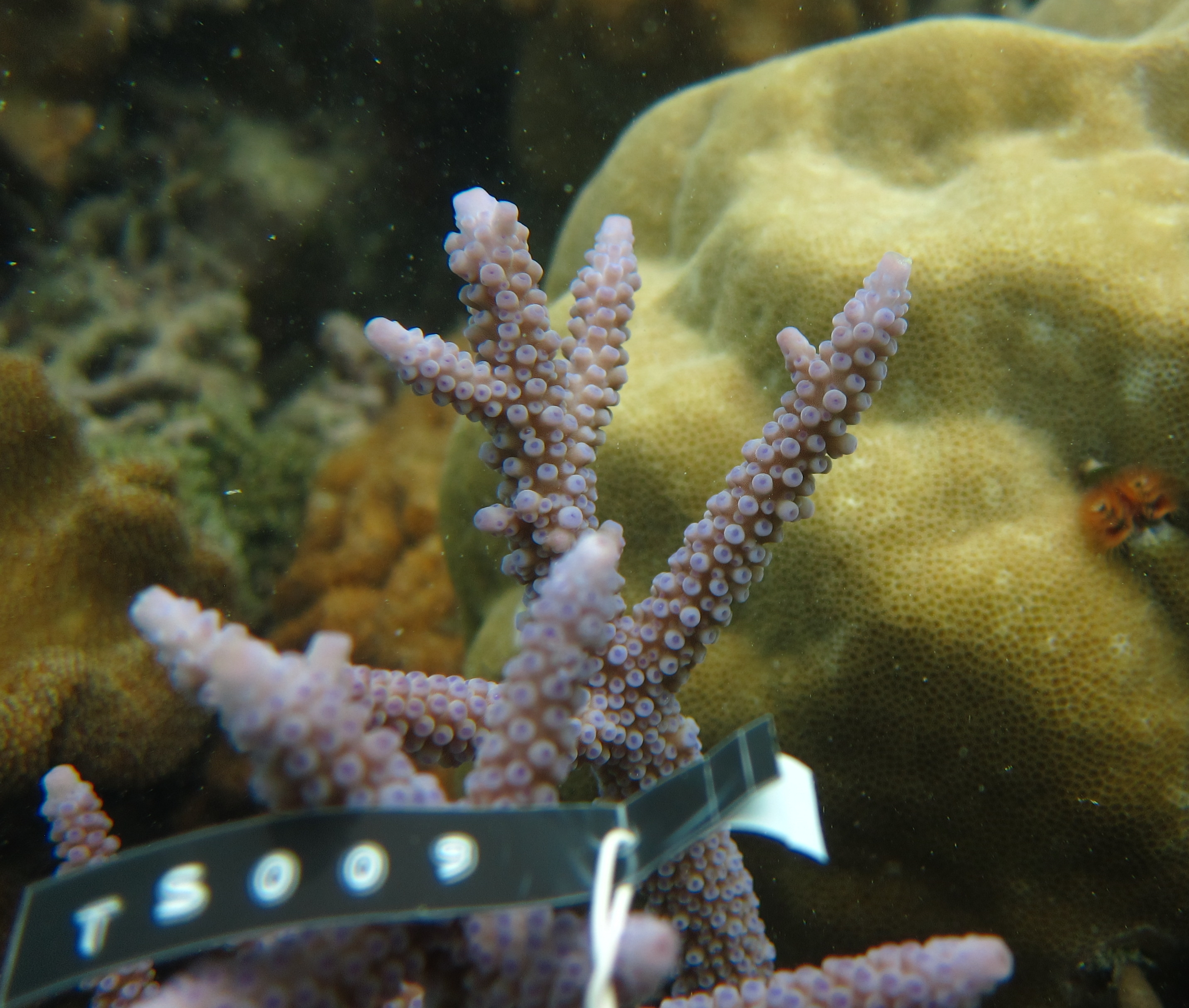 Acropora austera, detalle de coralitos, isla Aureed, Estrecho de Torres, Australia